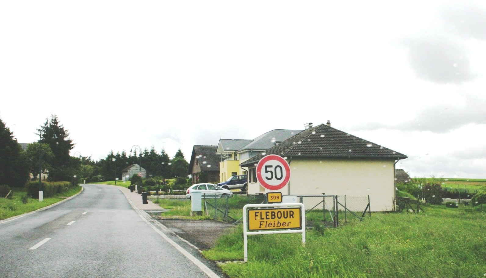 Op der Fléiber. Kategorie:Gemeng Bauschelt